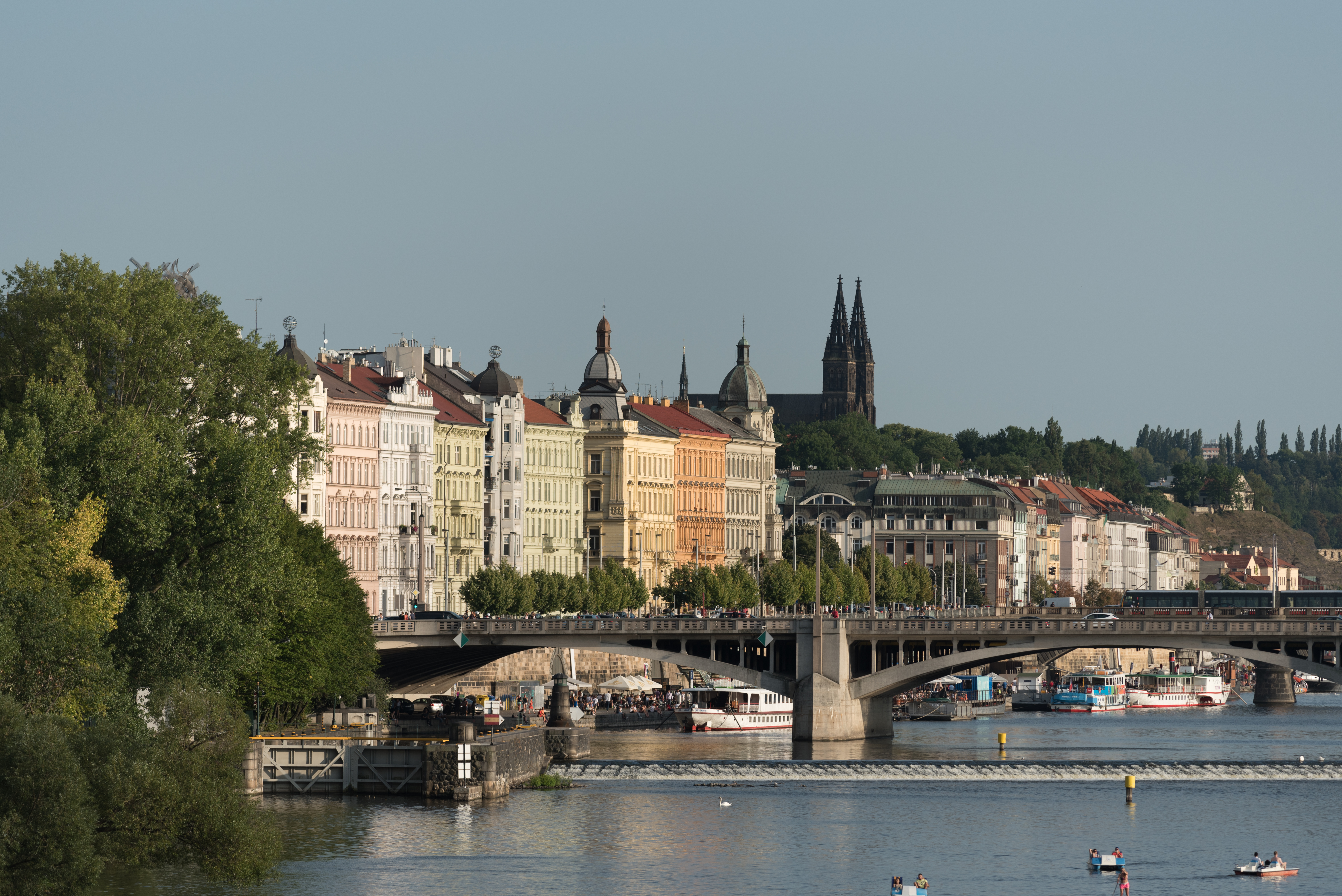 Praha, Jiráskův most, Vysherad